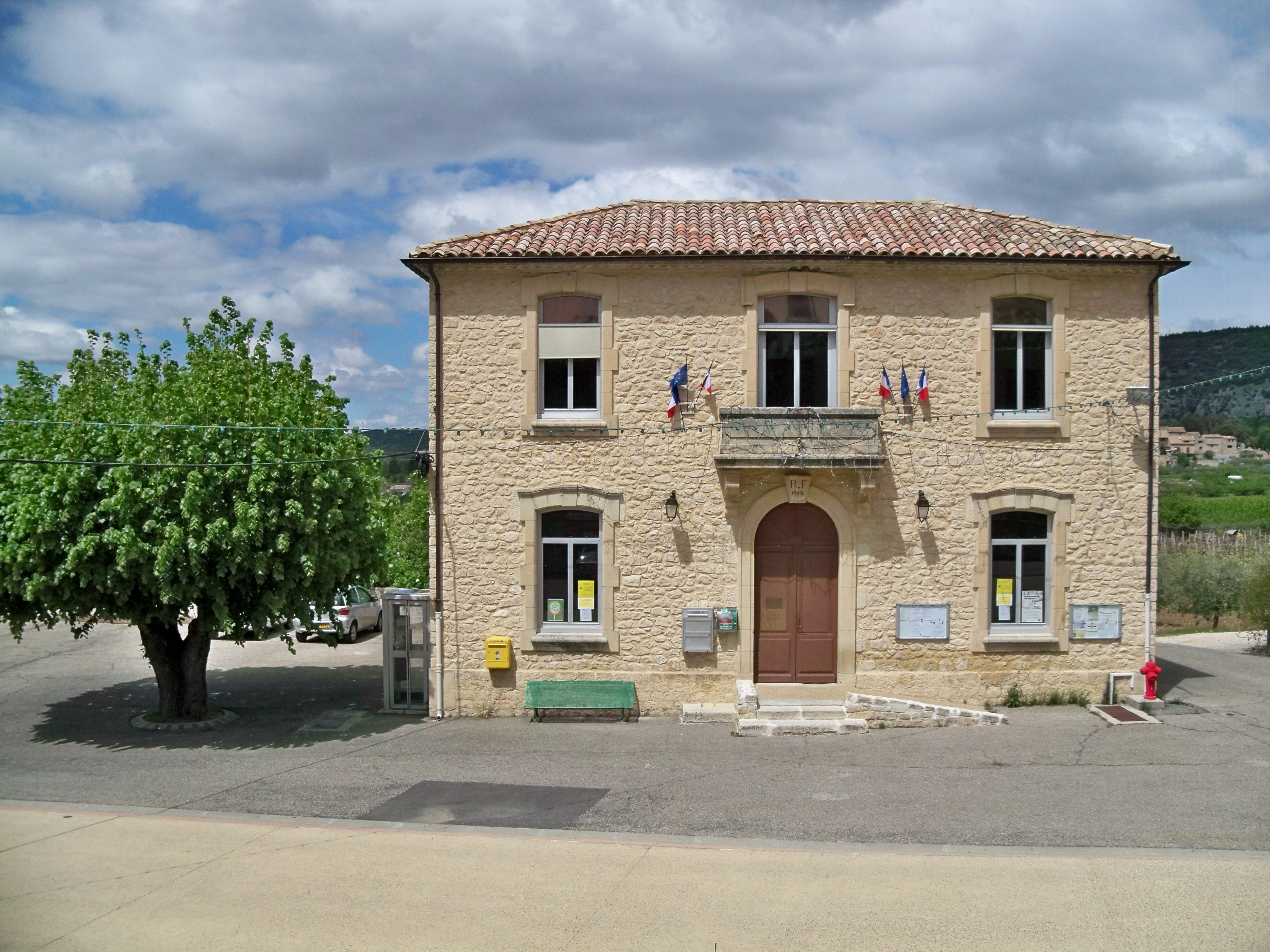 Mairie de Beaumont du Ventoux (84)